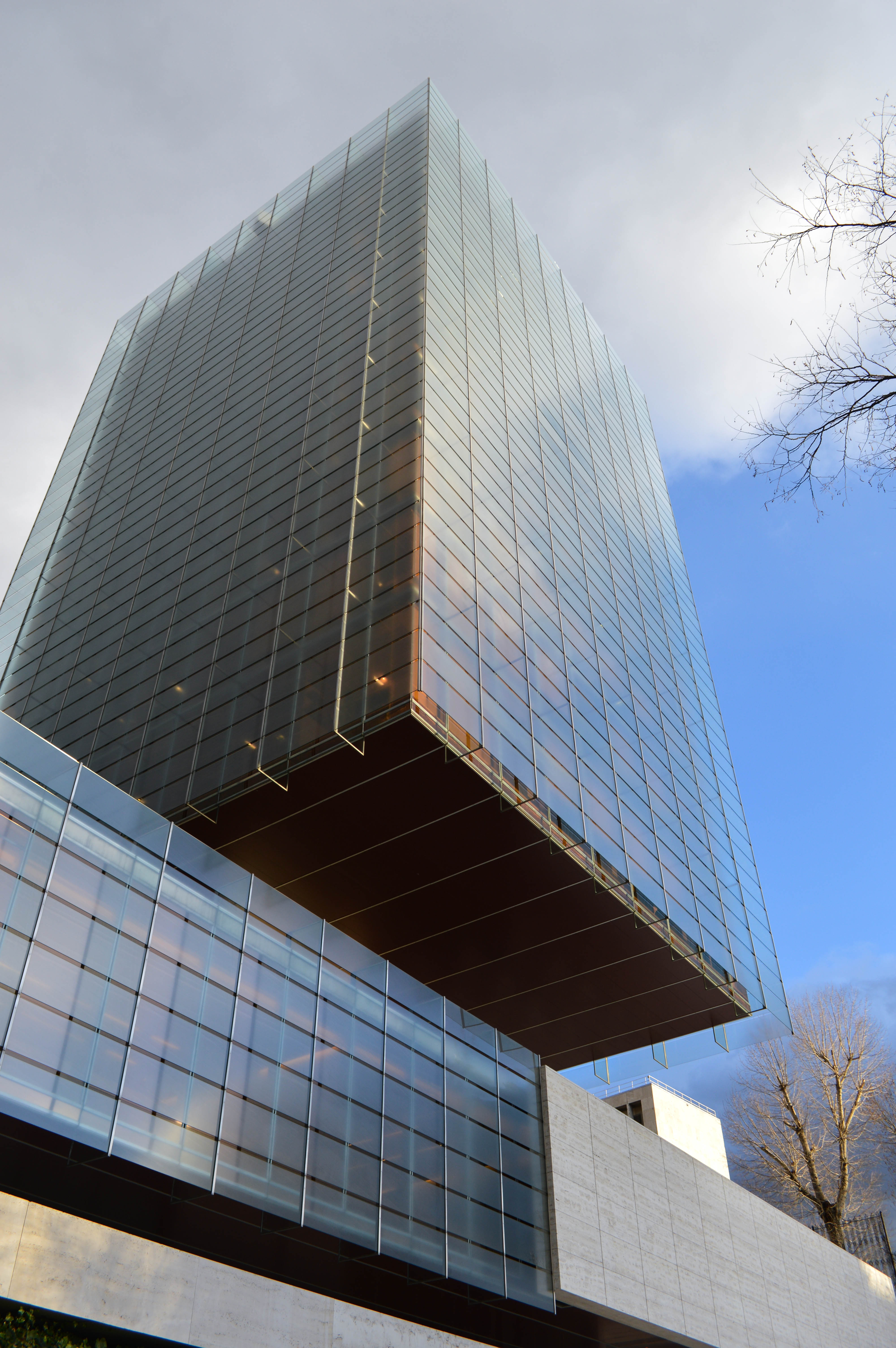 Edificio flotante